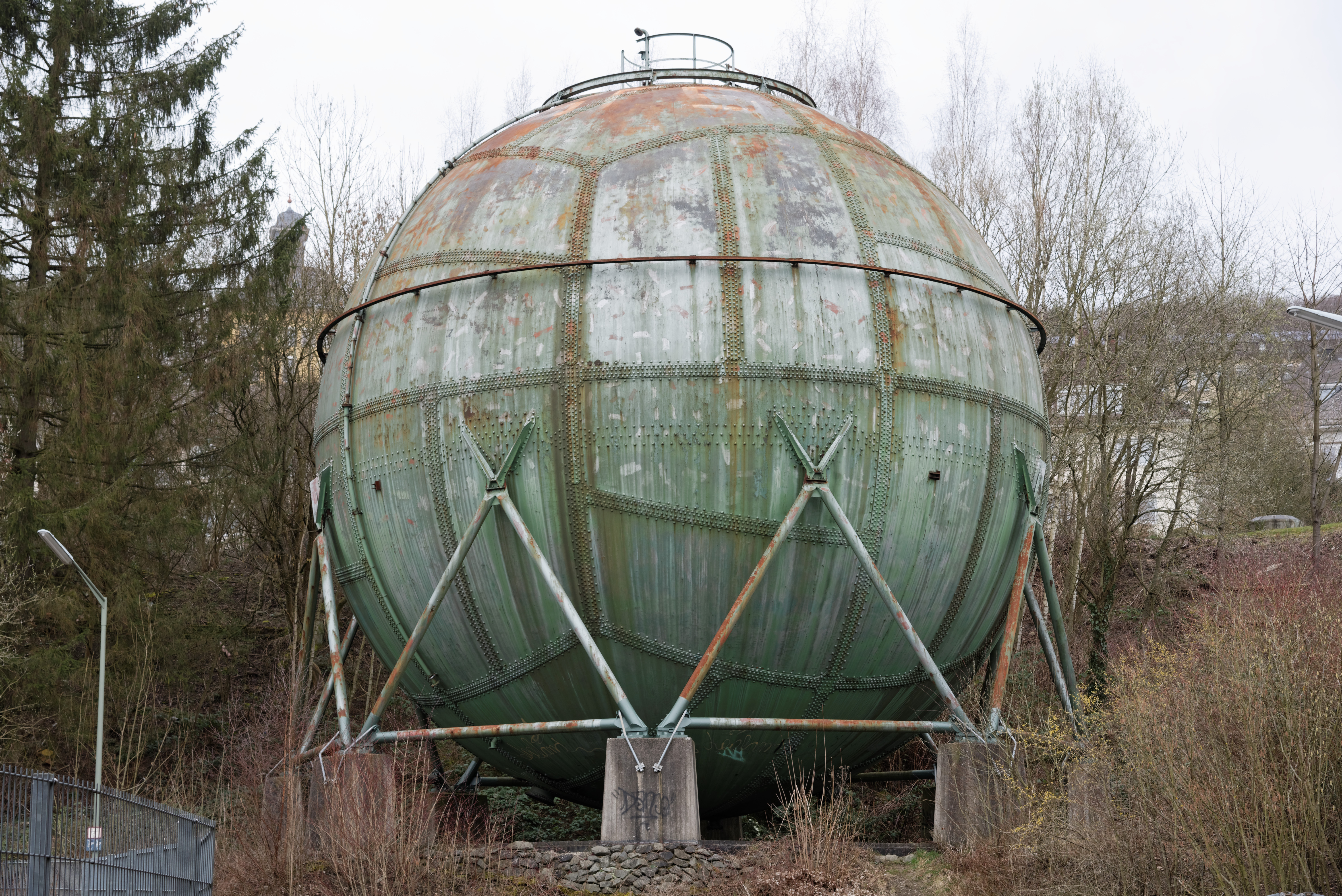 Industriedenkmal Kugelgasbehälter an der Friedrich-Friesen-Straße in der Kreisstadt Siegen im Kreis Siegen-Wittgenstein in Nordrhein-WestfalenThis is a photograph of an architectural monument., no. A-080